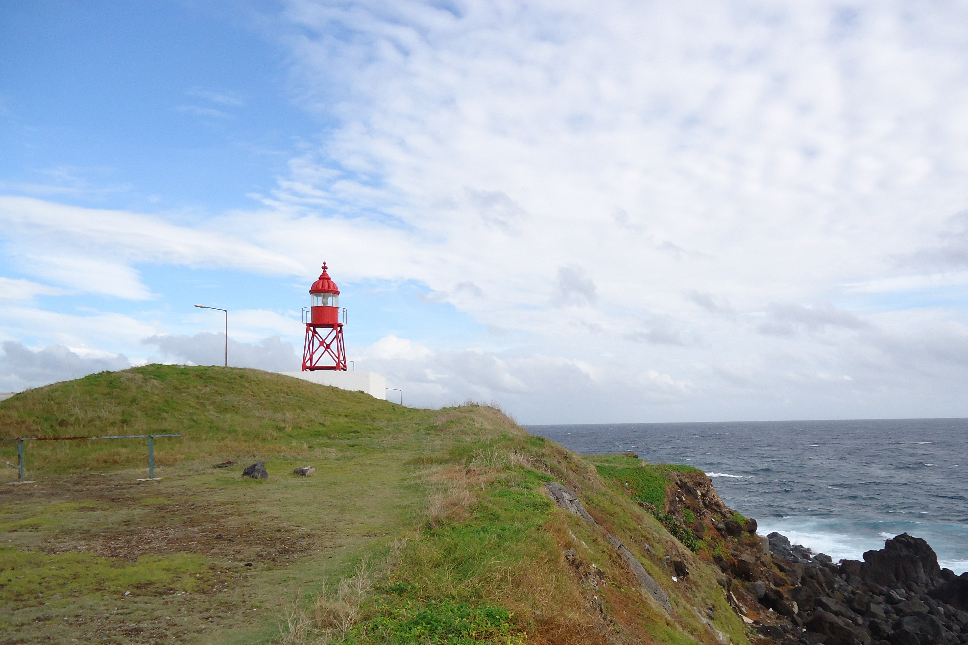 Farol de Santa Clara, cidade e concelho de Ponta Delgada, ilha de São Miguel, Açores.